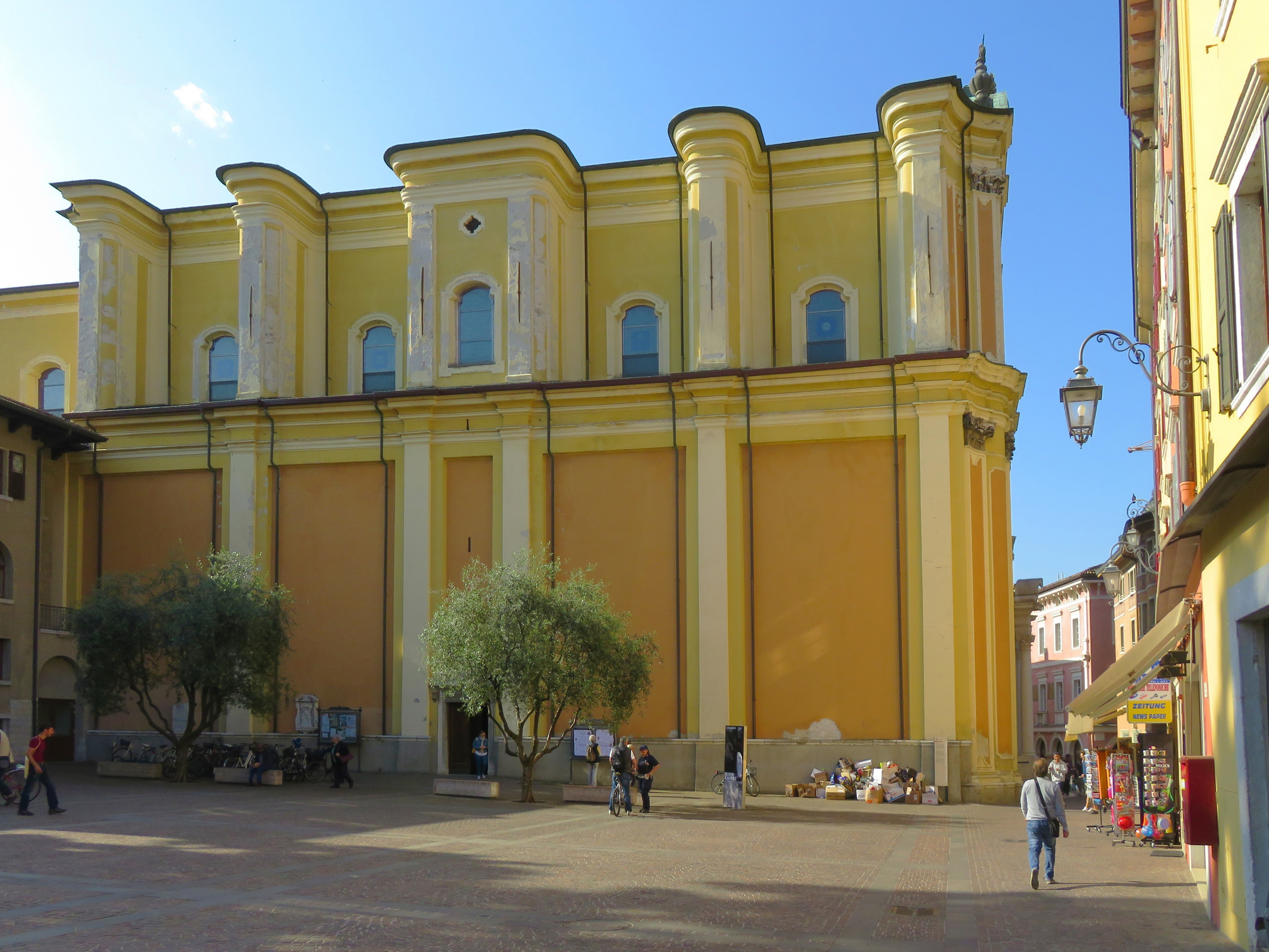 Chiesa di Santa Maria Assunta. Lato nord.